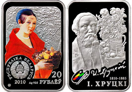 Серебряная монета Республики Беларусь, посвящённая 200-летию со дня рождения И. Ф. Хруцкого